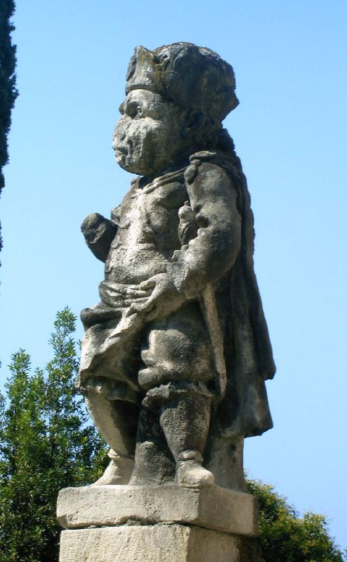 Verona, Veneto, Italia